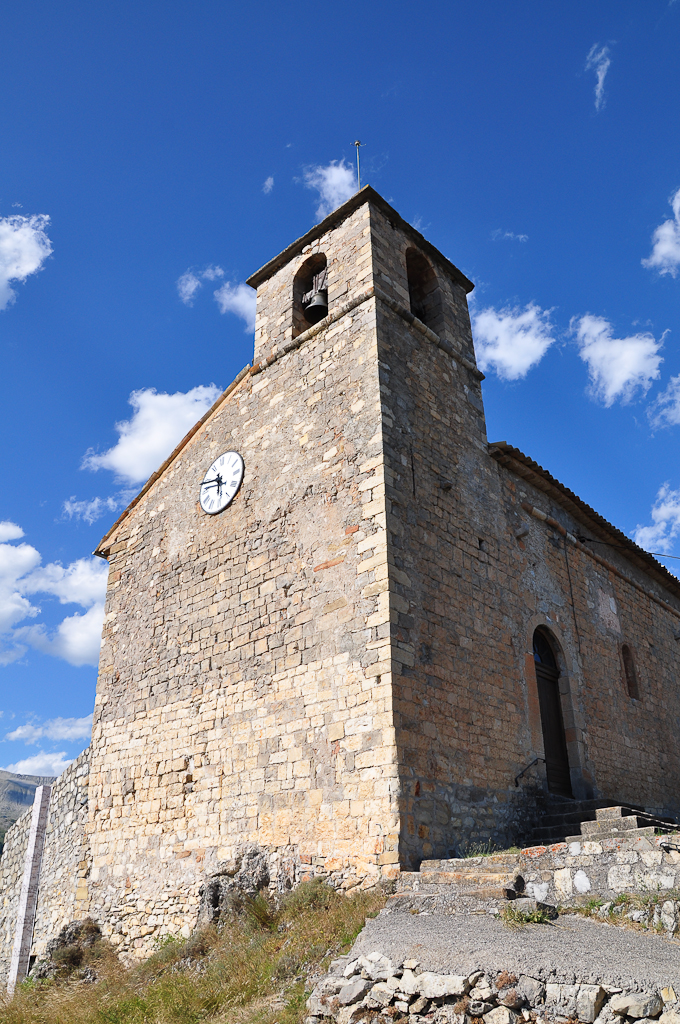 Église de Castellet-lès-Sausses